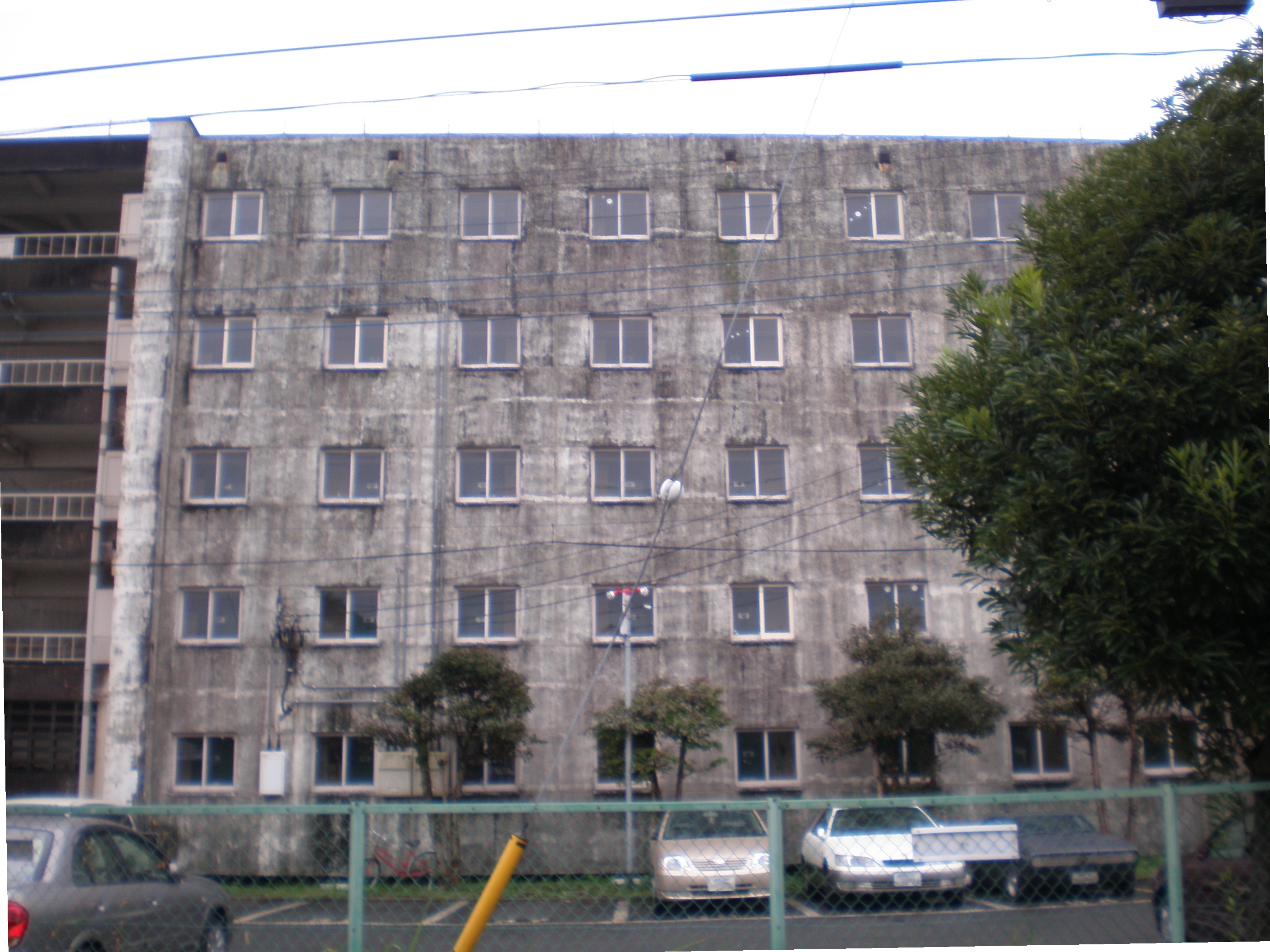 Ogikubo Danchi